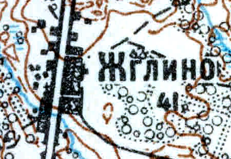 Топографическая карта Ленинградской области, квадрат VIc-28 (Луга), деревня Жглино